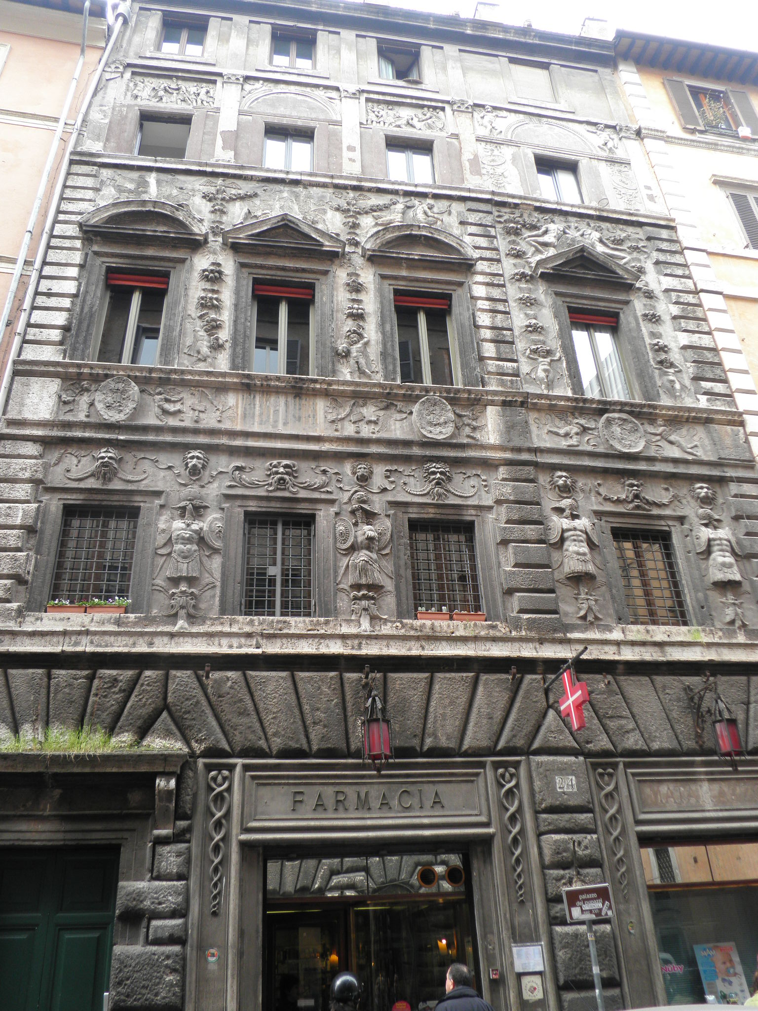 Roma, via dei Banchi Vecchi, casa Crivellii o dei pupazzi